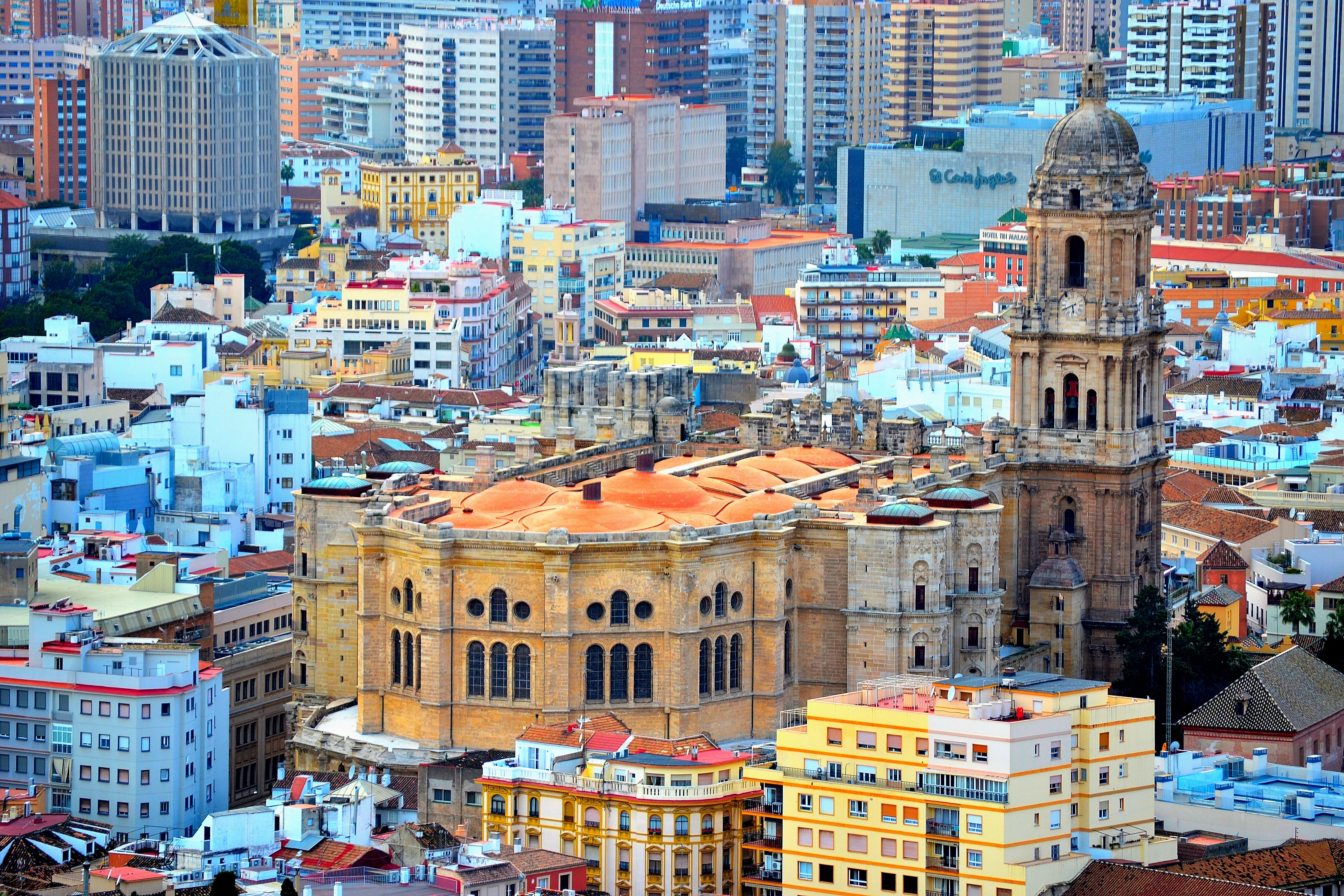 la manquita